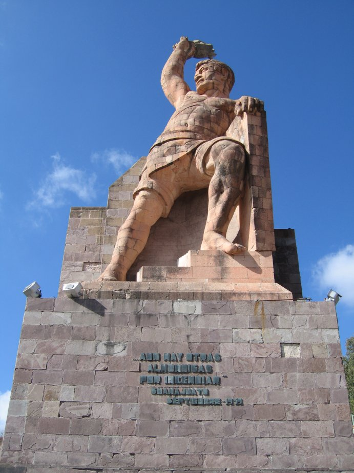 Monument El Pípila in Guanajuato, Mexico